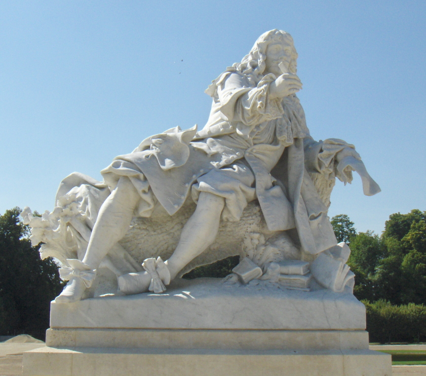 Statue de Molière (1622-1673) par Tony Noël (1845-1909) réalisée en 1882. Située dans le parc du château de Chantilly. Vue après restauration en 2009.